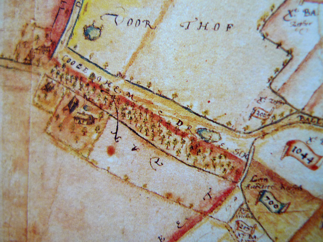 De Kolegemdries op een kaart uit 1576 (Rijksarchief Gent)